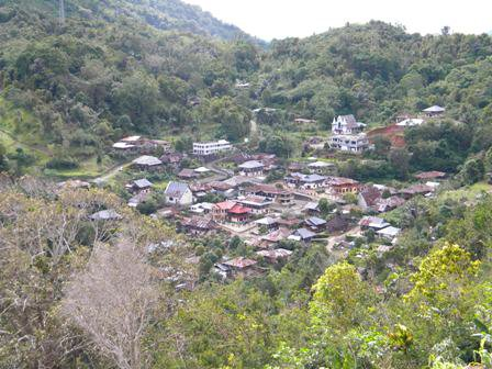 maumbi tercinta